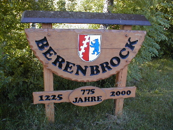 Ortstafel Berenbrock